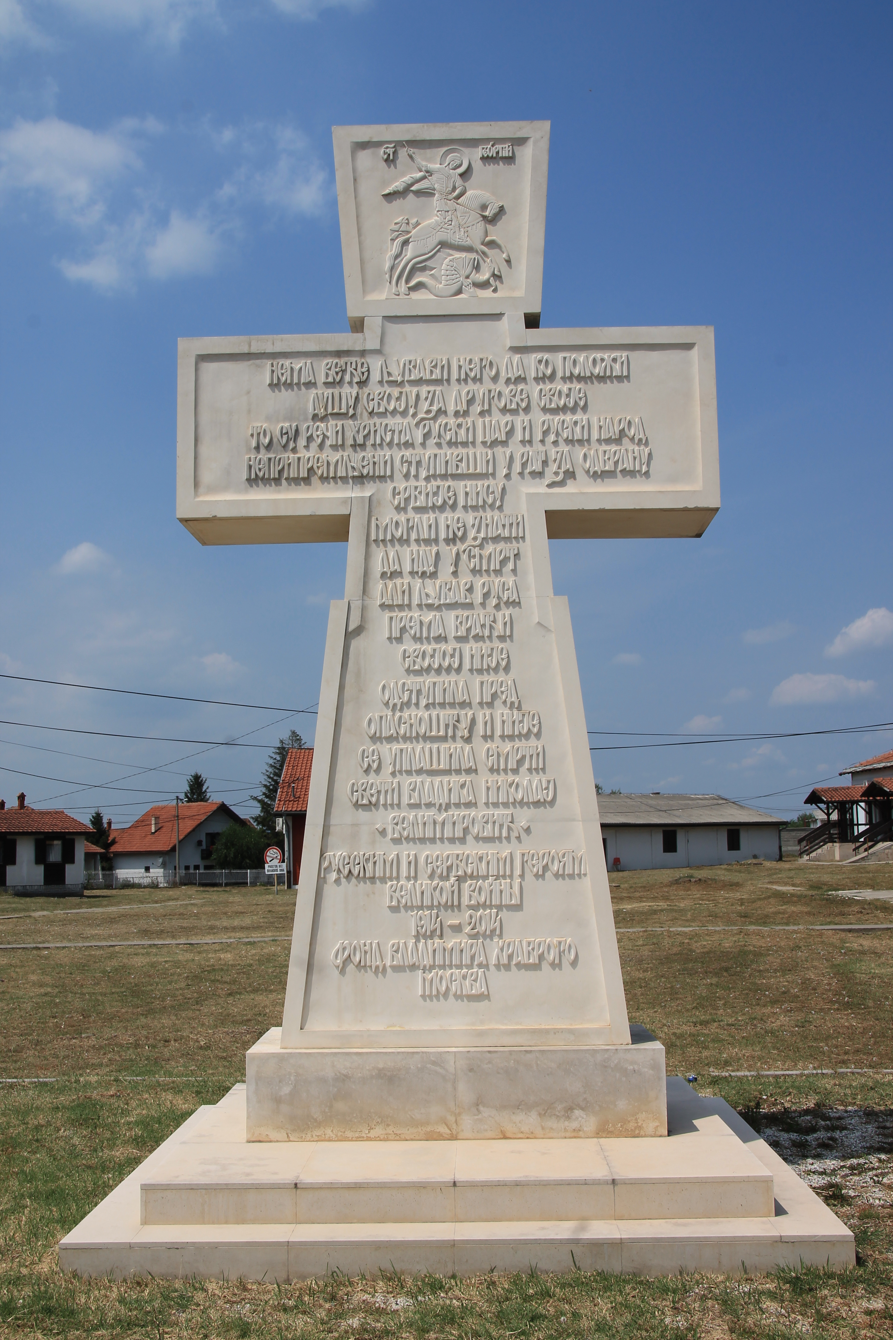 Poklonički krst